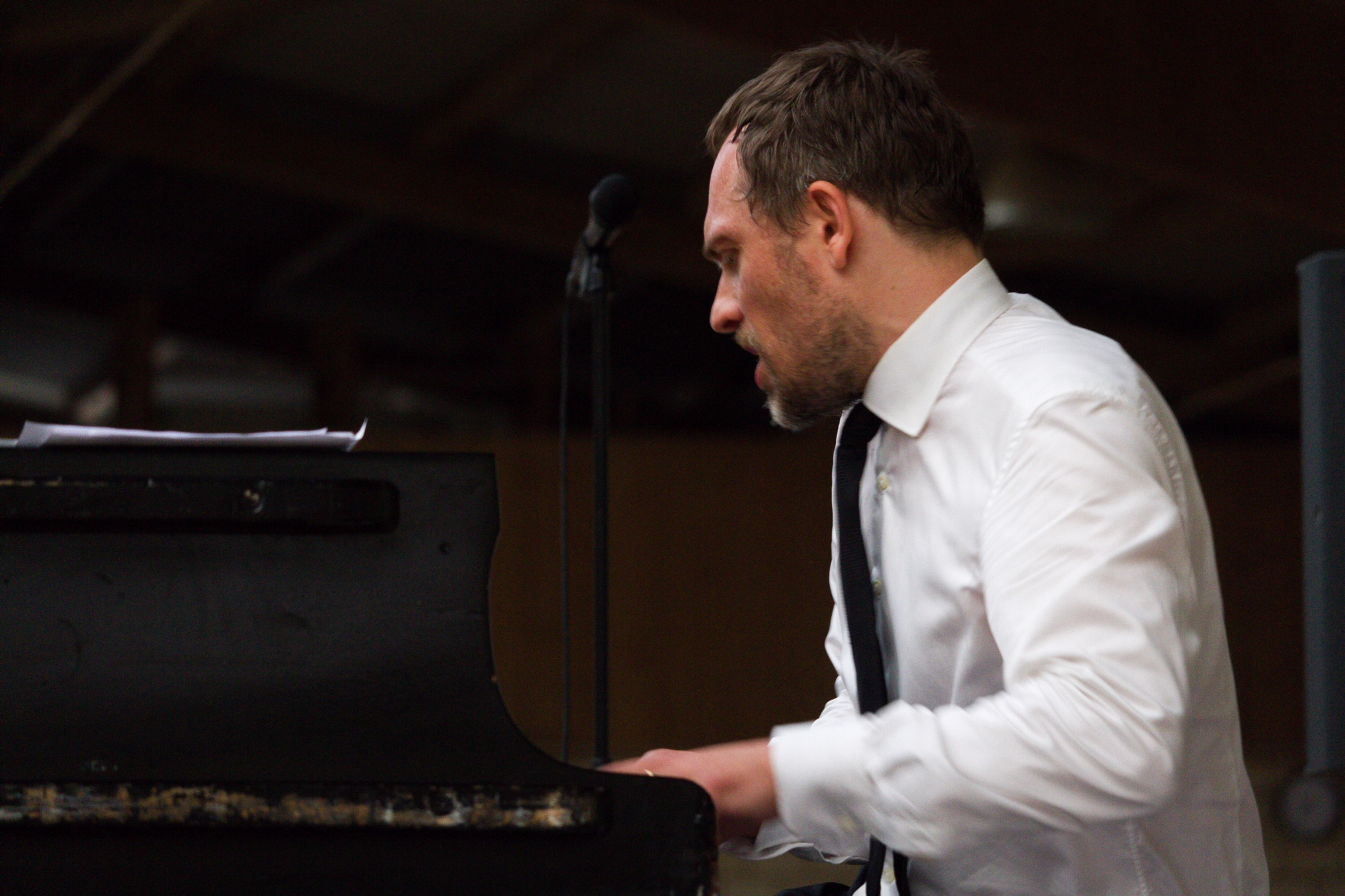 Marlo Thinnes (*16 September 1976 in Saarbrücken) ist ein deutscher Pianist.